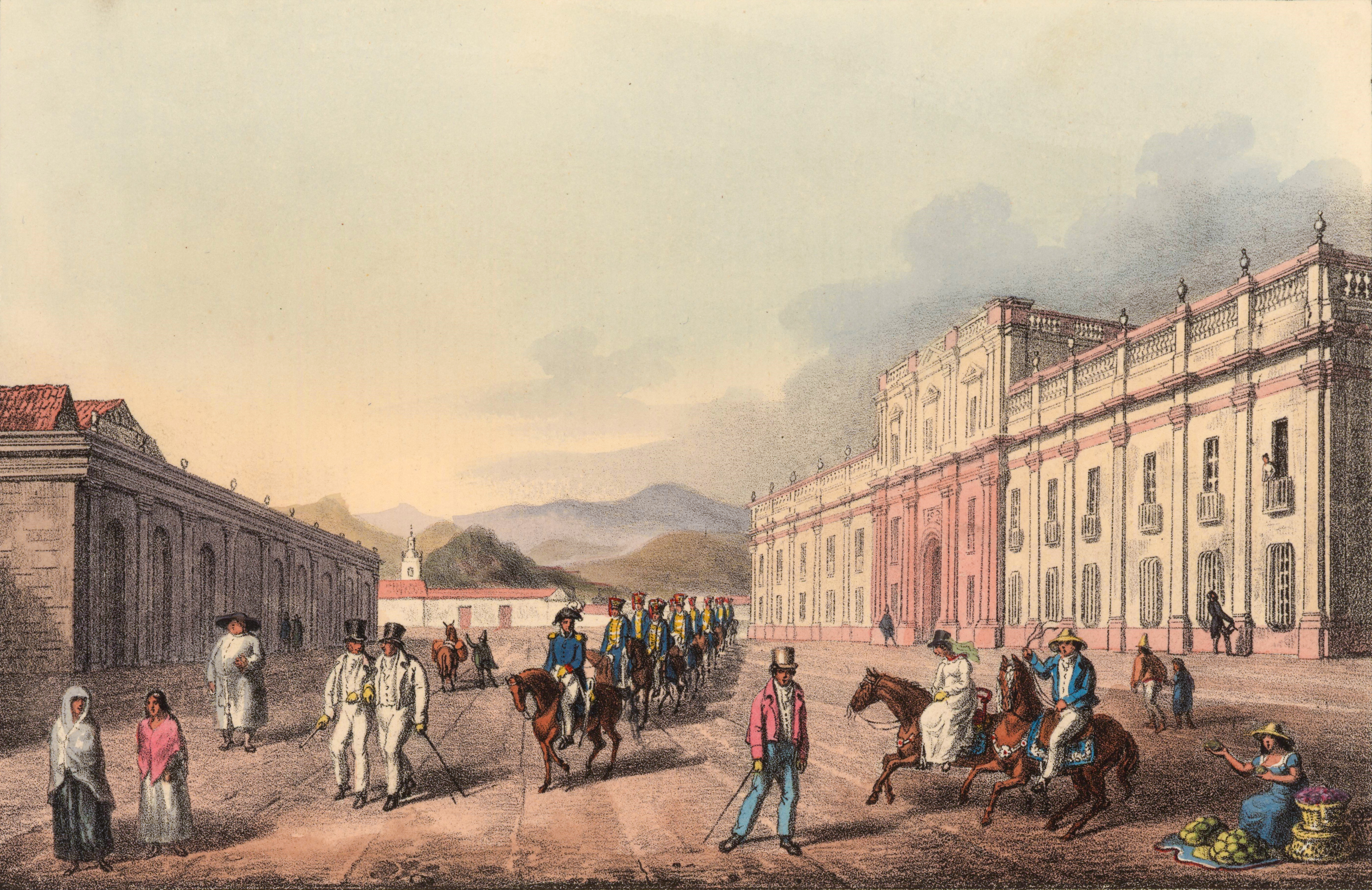 Litografía coloreada de George Johann Scharf según boceto del médico inglés James Paroissien (conocido en América Latina como Juan Diego Paroissien o Diego Paroissien), impresa por Rowney & Forster y publicada por Peter Schmidtmeyer en su libro Travels into Chile, over the Andes, in the years 1820 and 1821, London: Longman, Hurst, Rees, Orme, Brown and Green, 1824. Frente a La Moneda se alzaba el edificio que ocupó el Ministerio de Guerra y que fue demolido en los años 1930 para crear la actual plaza de la Constitución. El espacio entre ambos se convirtió en la plazuela antecesora de esta, con dos pilas de agua y la estatua de.